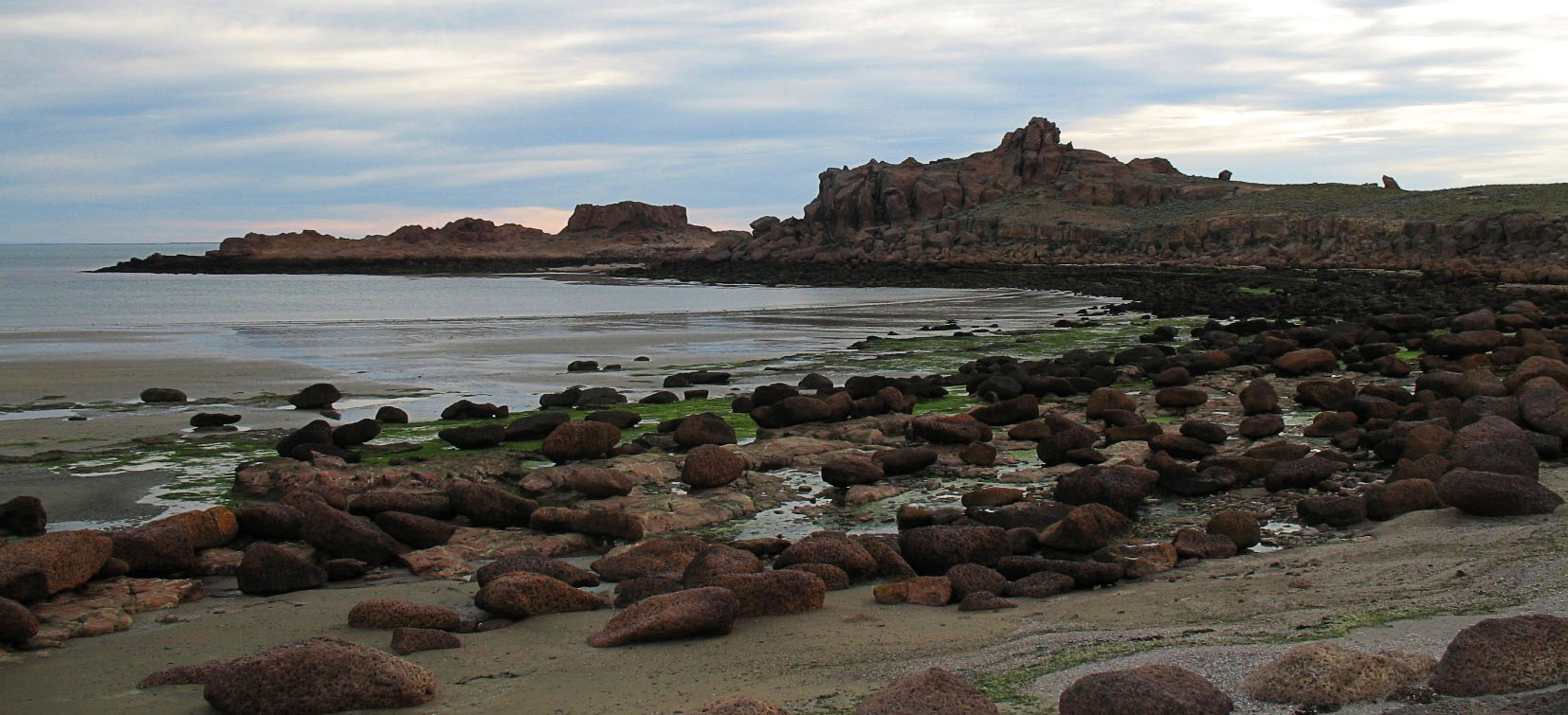 Vista de la costa de Punta Foca desde la bahía interna